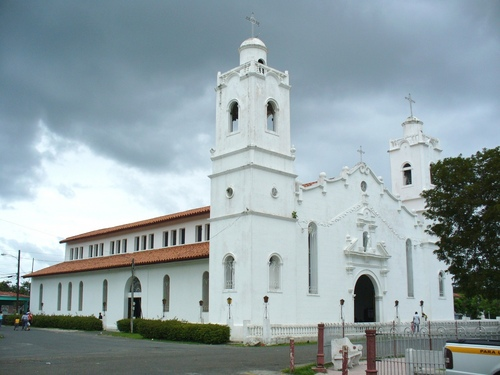 Iglesia Central de Penonome